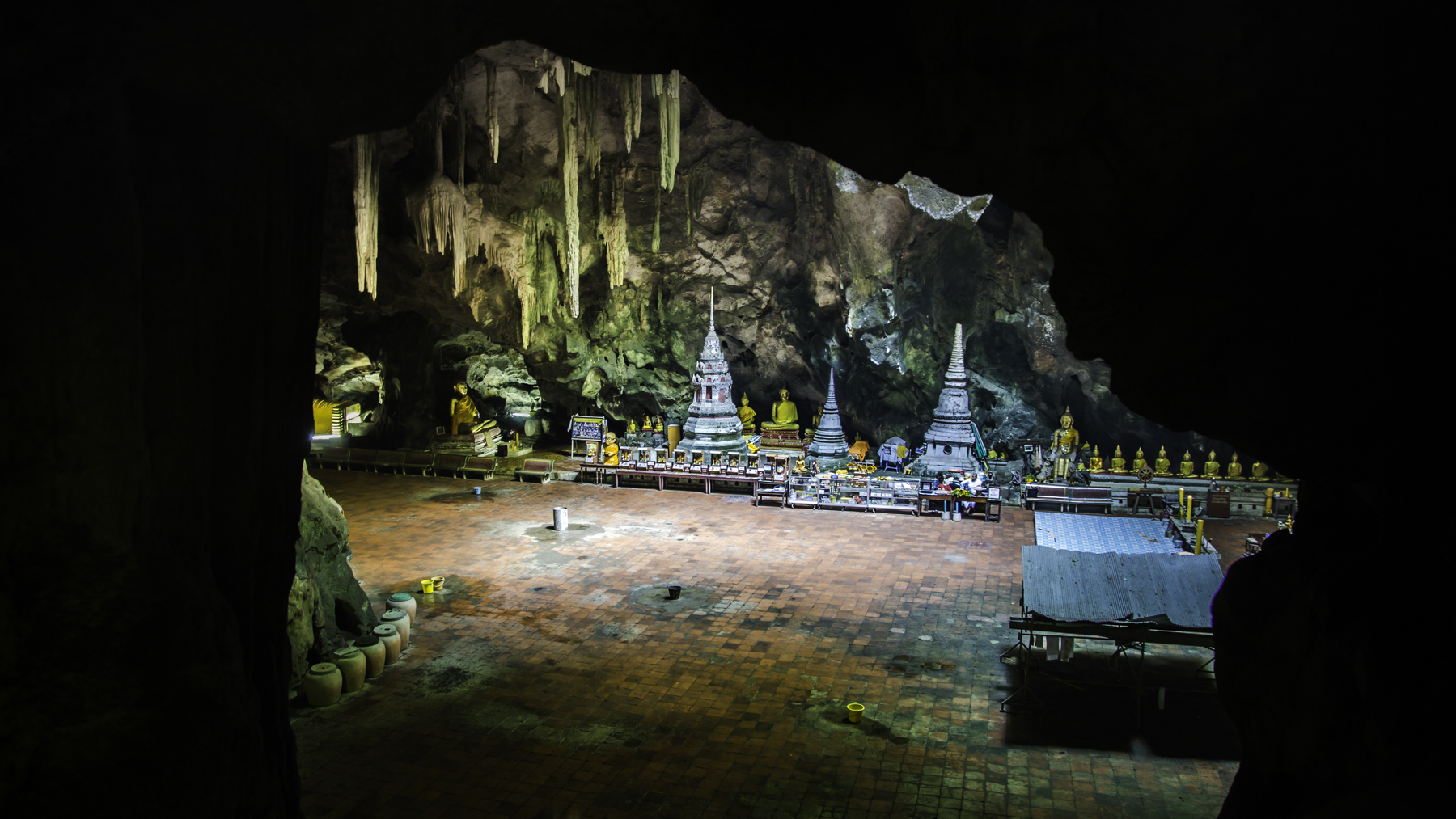 ที่นี่ คือ ถ้ำเขาหลวง ตั้งอยู่จังหวัดเพชรบุรี ที่นี่เป็นอีกที่หนึ่งที่เป็น unseen thailand ของไทย